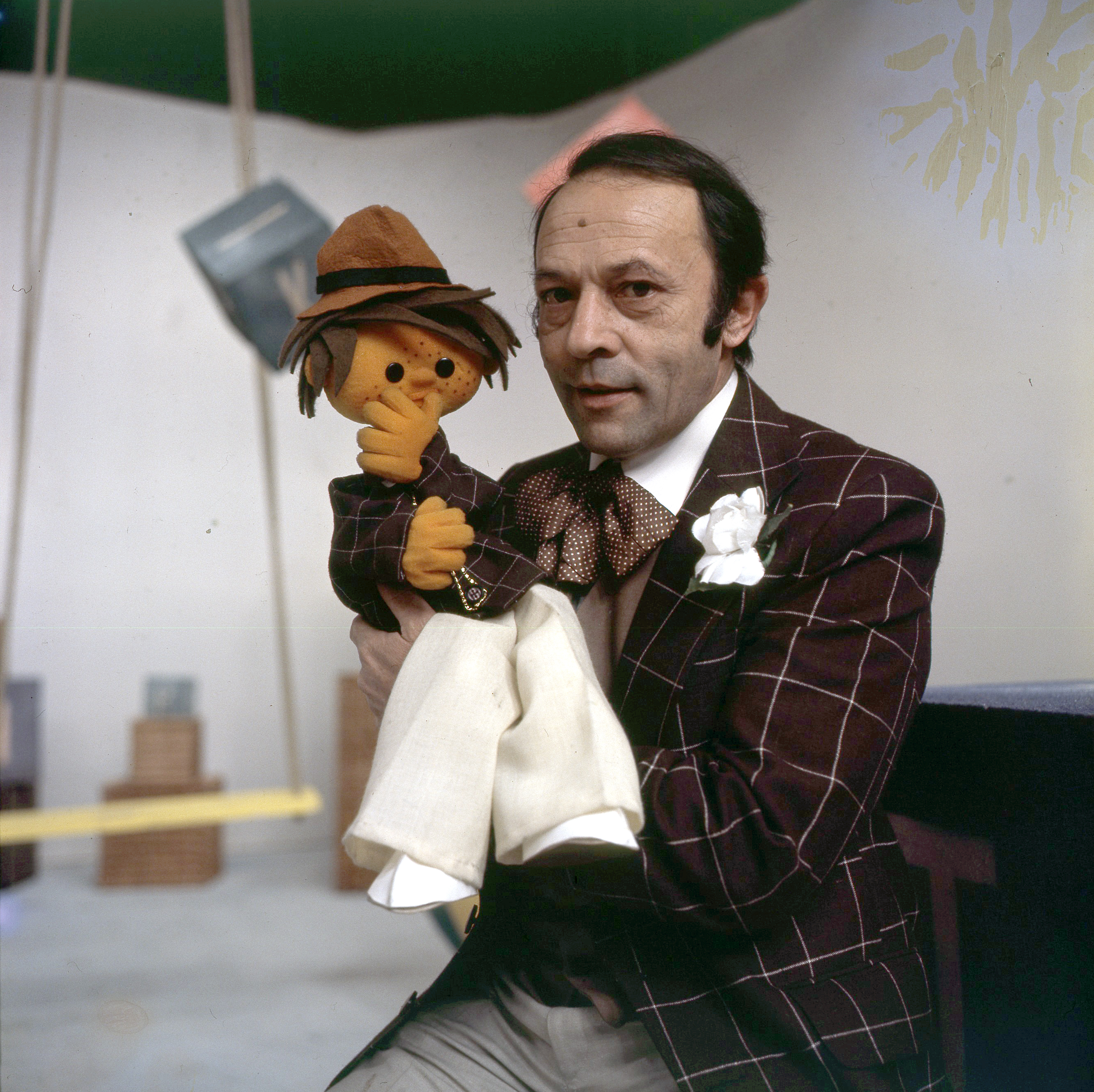 Mića Tatić i Aćim u seriji "Na slovo, na slovo" 1975. godine.foto Stevan Kragujević (po odobrenju kćerke Tanje Kragujević)